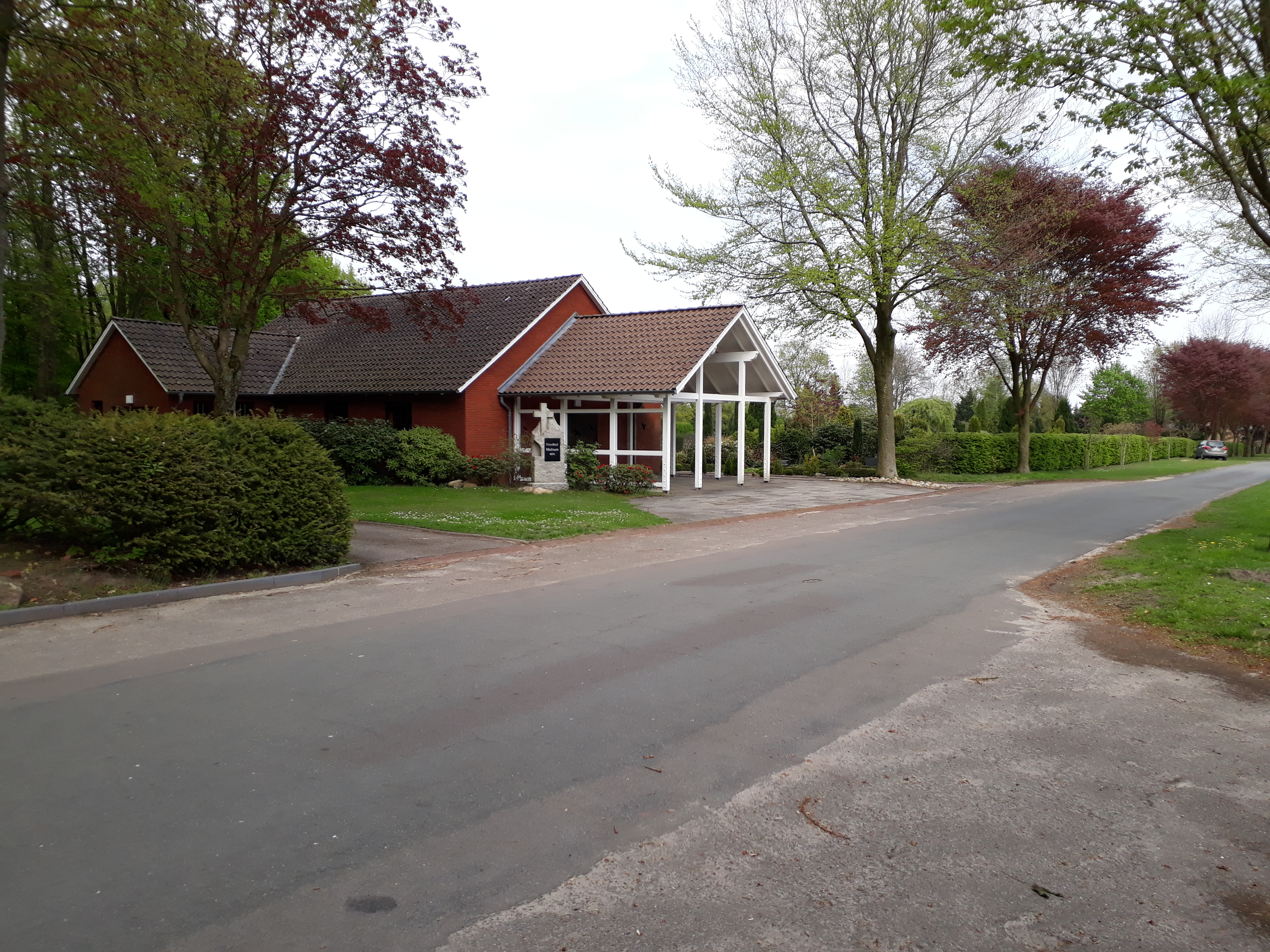 Friedhof in Musum, Gemeinde Kutenholz, Landkreis Stade in Niedersachsen.